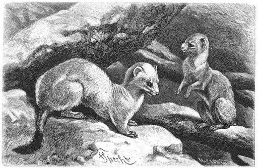 Hermelĳn (Putorius erminea) in zijn winterkleed. Currently: Mustela erminea